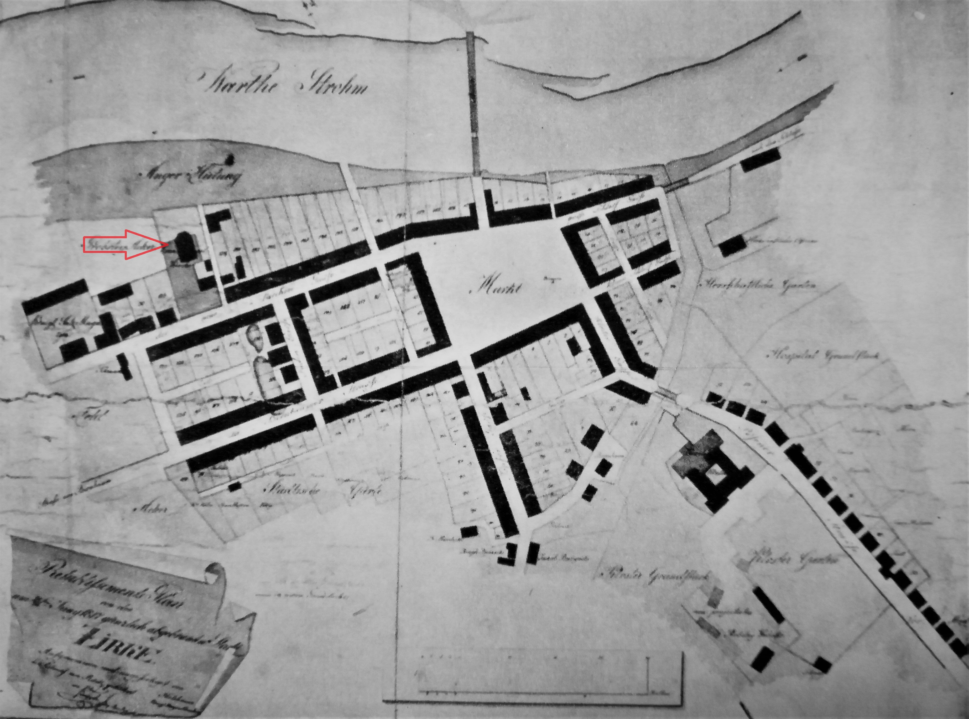 Plan Sierakowa autorstwa Holzhauera z 1817 r.